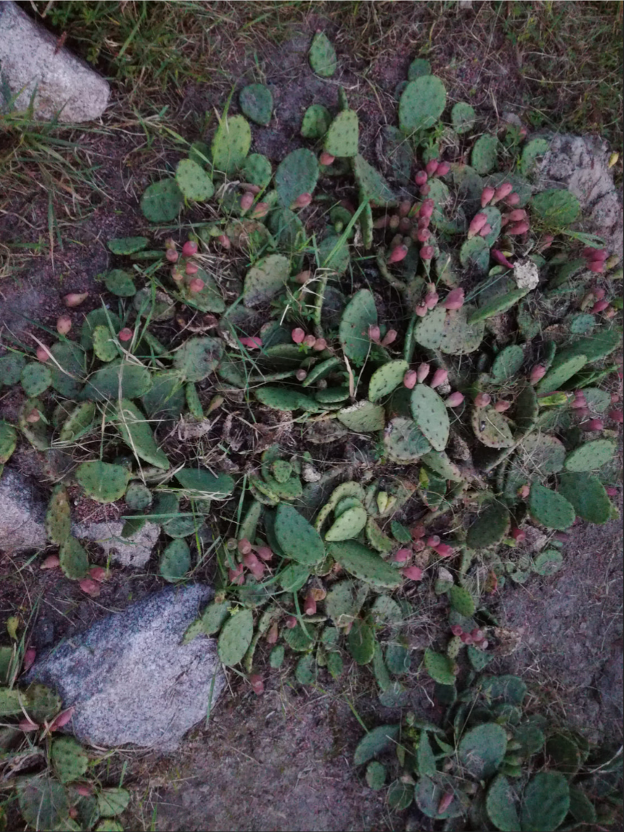 Опунция в НБС им. Гришко